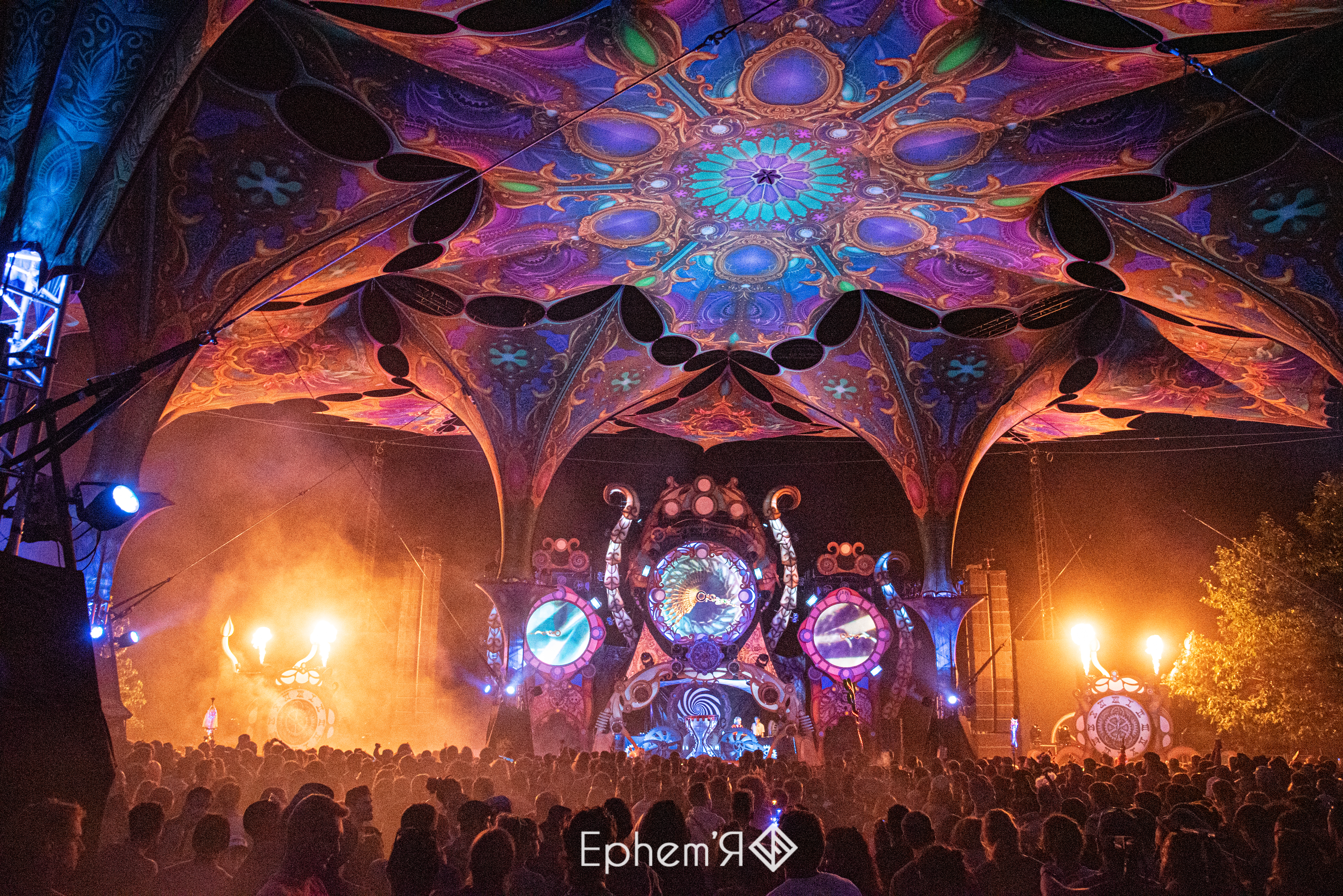 Décorations et scénographies par Les Lucioles, MAE & MOA, Vizual Invaders et Light Process.